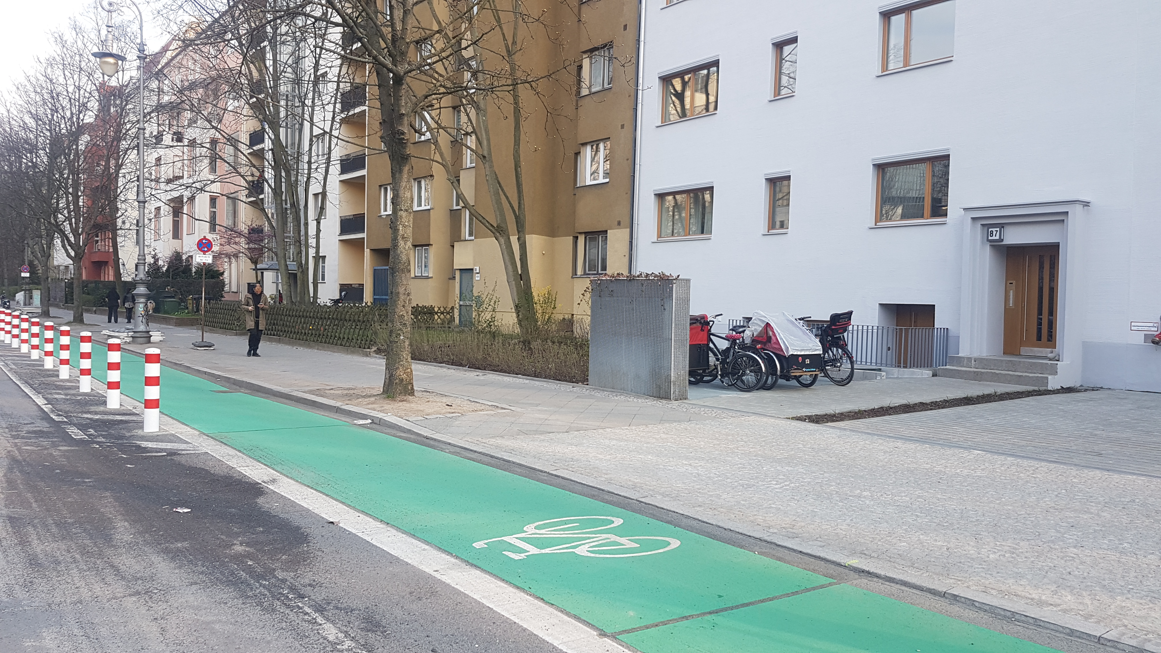 Radweg Hasenheide